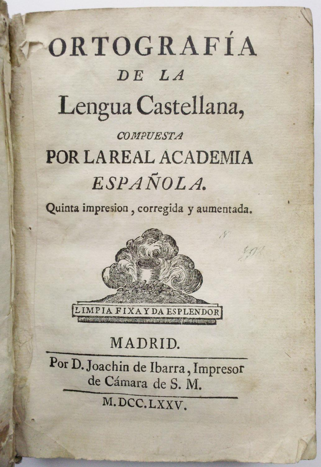 Primera página de la Ortografía de la lengua castellana (quinta impresión, corregida y aumentada) de 1775. Publicada en Madrid por la Real Academia Española en la imprenta de Joachin (Joaquín) de Ibarra.